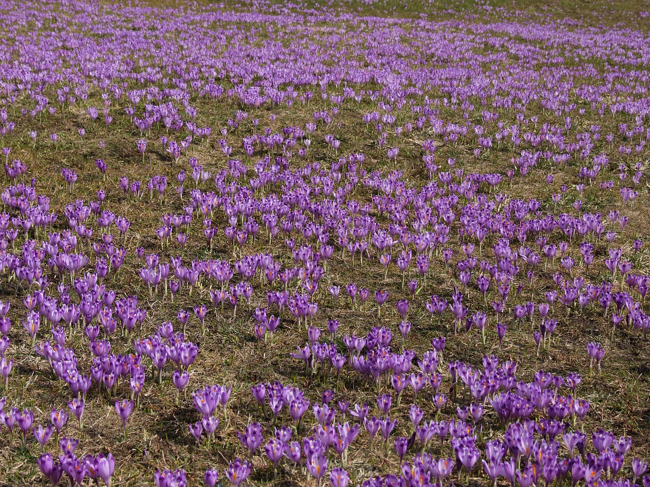 Crocus vernus (syn. C. scepusiensis); habitat: Gorce, przysiółek Rzeki w Lubomierzu, Poland.